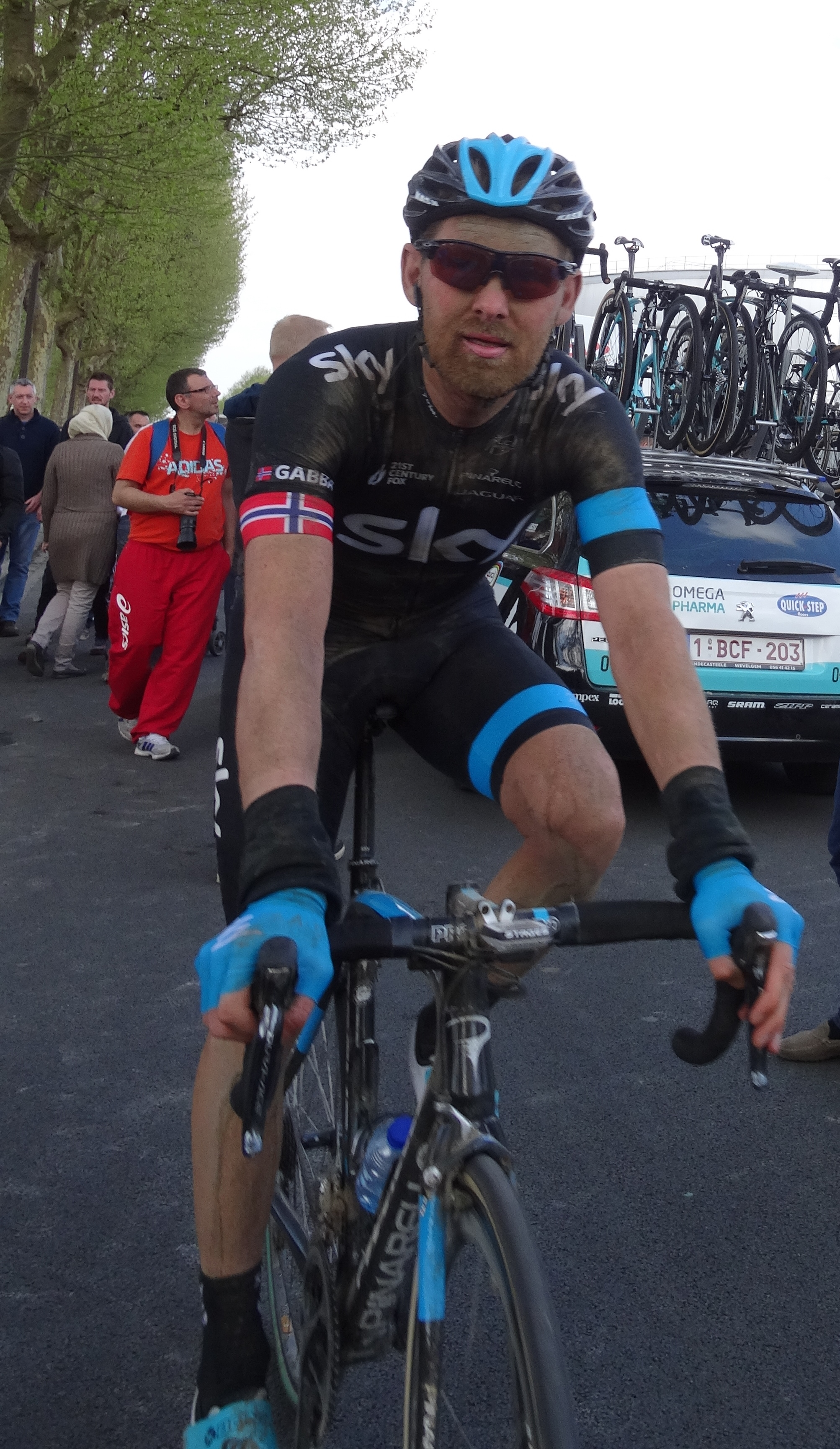 Retour des cyclistes à leurs bus après l'arrivée du Paris-Roubaix 2014 et pendant la remise des prix, le 13 avril 2014, à Roubaix, Nord, Nord-Pas-de-Calais, France. Depicted person: Gabriel Rasch